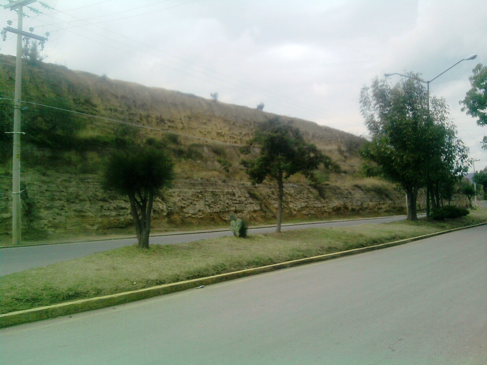 Jales de Pachuca, estado de Hidalgo, México.